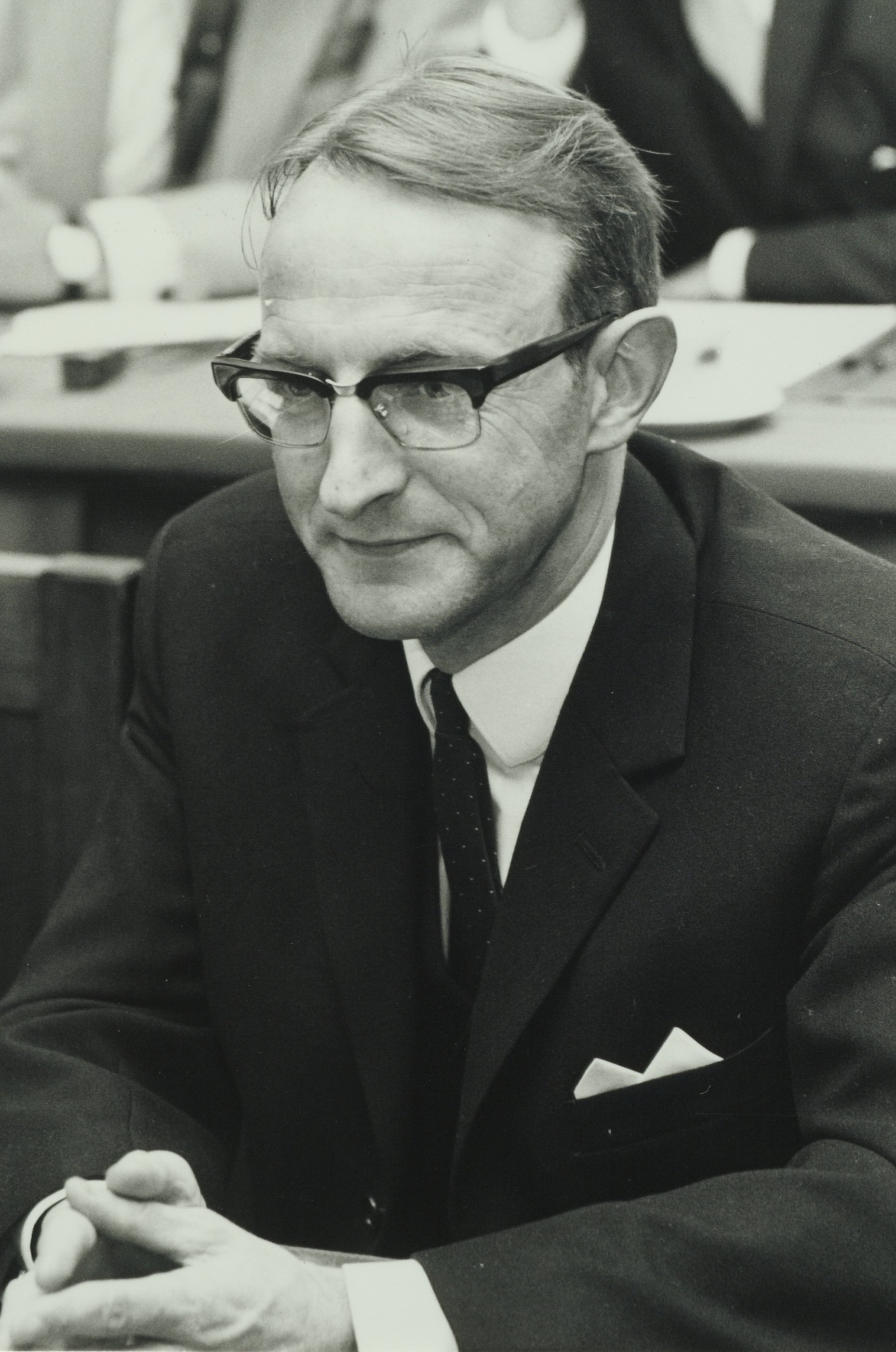 CollectieCollectie Fotoburo de BoerInventarisnummerNL-HlmNHA_5400463752 BeschrijvingSmal, Drs. C.A.FotonummerNL-HlmNHA_5400463752DocumenttypePortrettenVervaardigerBoer, Cees de (1918-1985) LandNederland ProvincieNoord-Holland GemeenteHaarlem PlaatsHaarlem Begindatum1974Einddatum1974TechniekFoto Plaatsinggb29